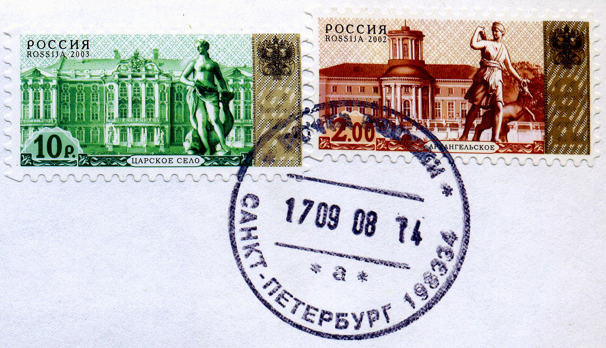 Марки России со штемпелем Санкт-Петербурга